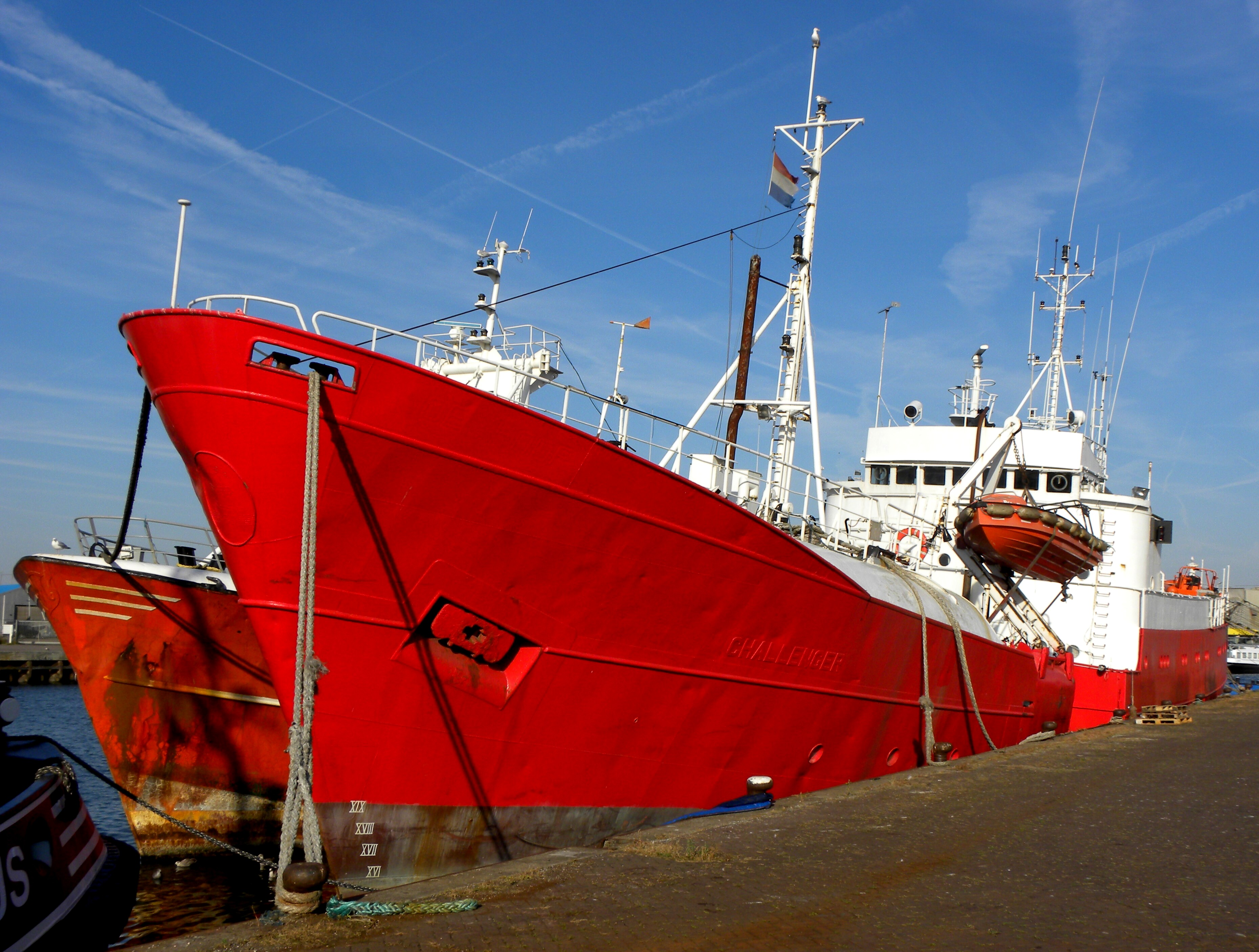 Timor Challenger -Panama - IMO 6402901 -build 1963 as hospitaal-kerkschip De Hoop IV